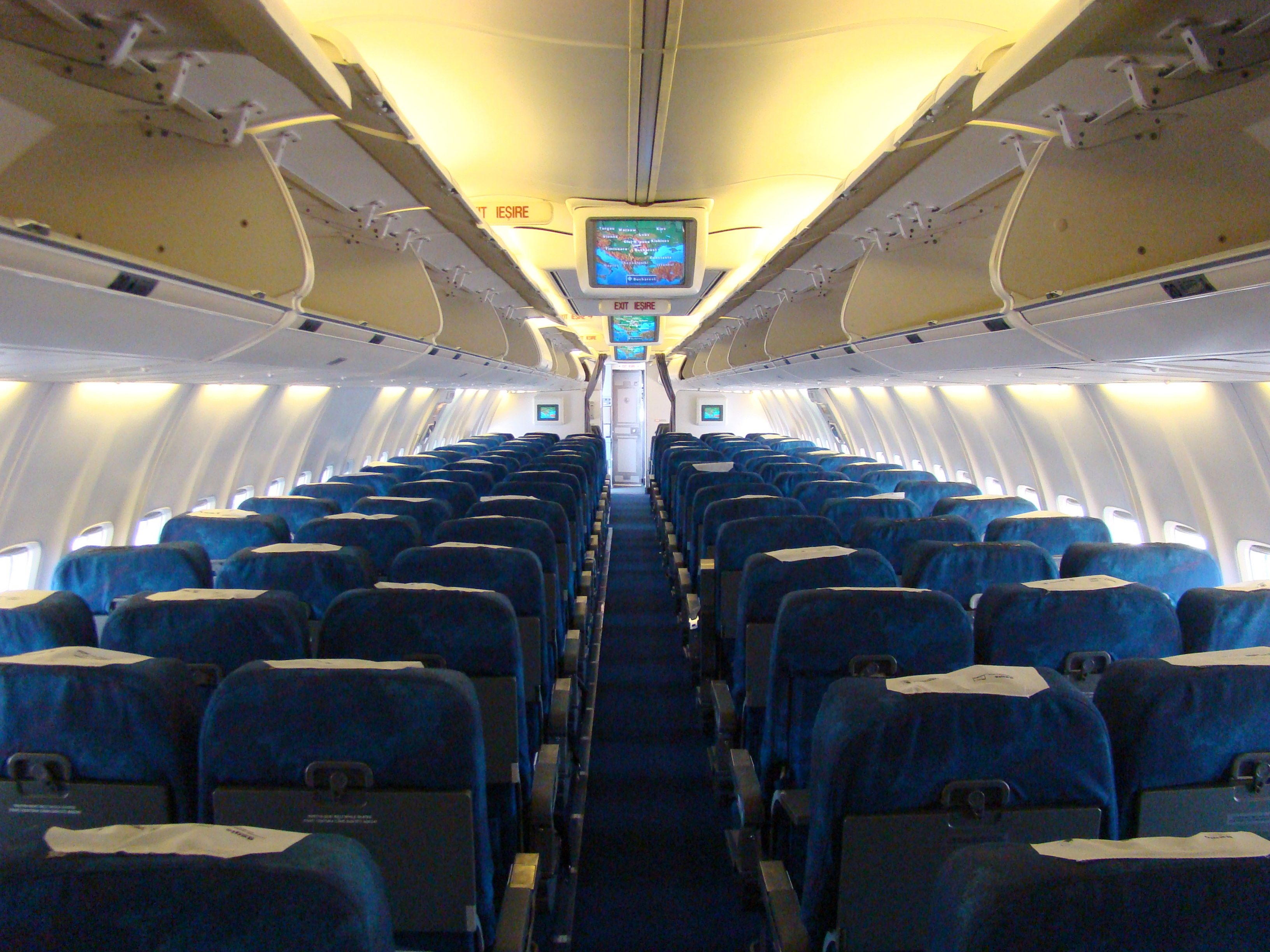 Cabina pasagerilor, avionul Boeing 737-700 „Craiova" al companiei TAROM